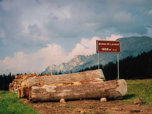 Pashoogte van de Lavazè Sjabloon:Alpenpas